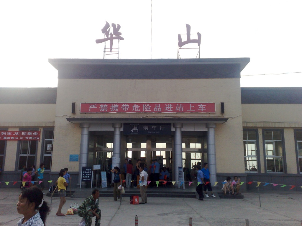 华山站